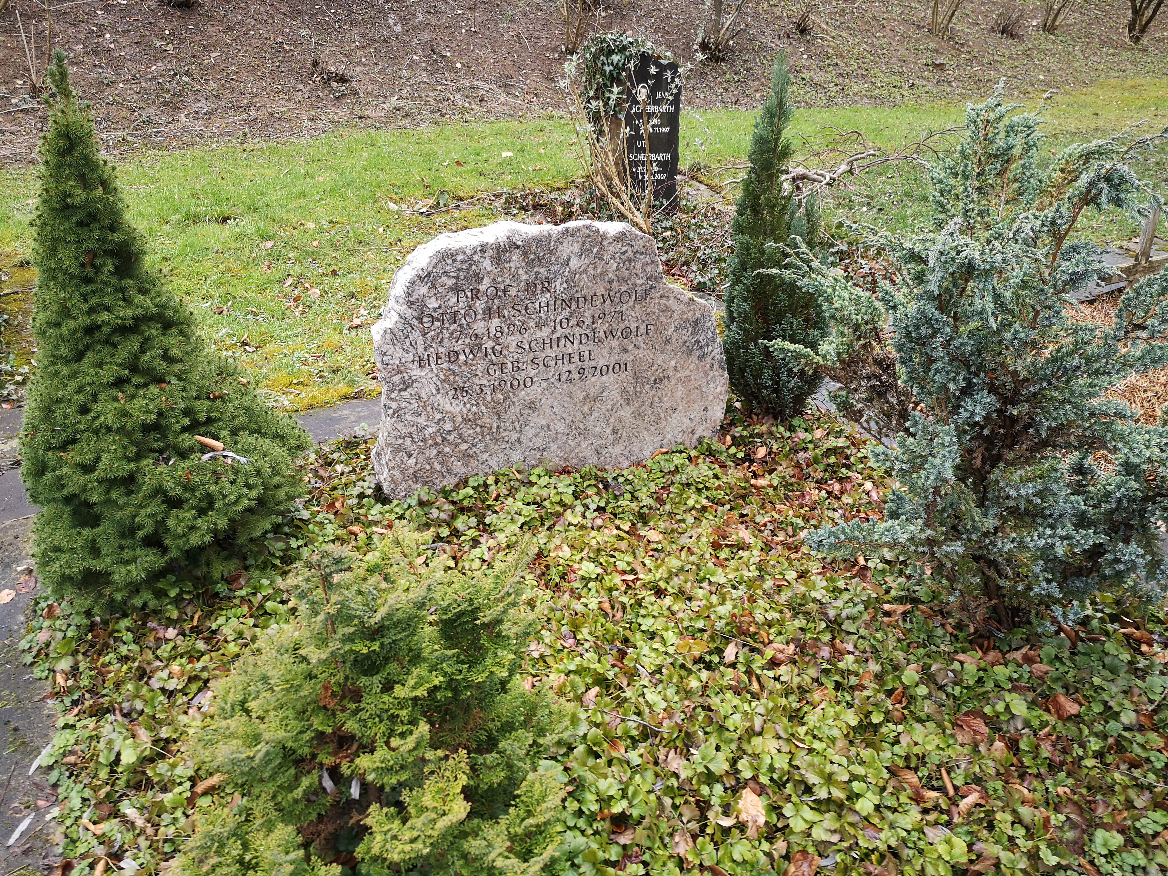 Grabstelle von Otto H. Schindewolf und Hedwig Schindewolf am Bergfriedhof Tübingen